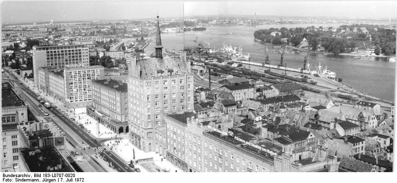 Rostock, Lange Straße, Hafen, Güterbahnhof ADN-ZB Sindermann 7.7.1972 Rostock: Blick auf das Zentrum der Hafenstadt -In Vorbereitung der Ostseewoche